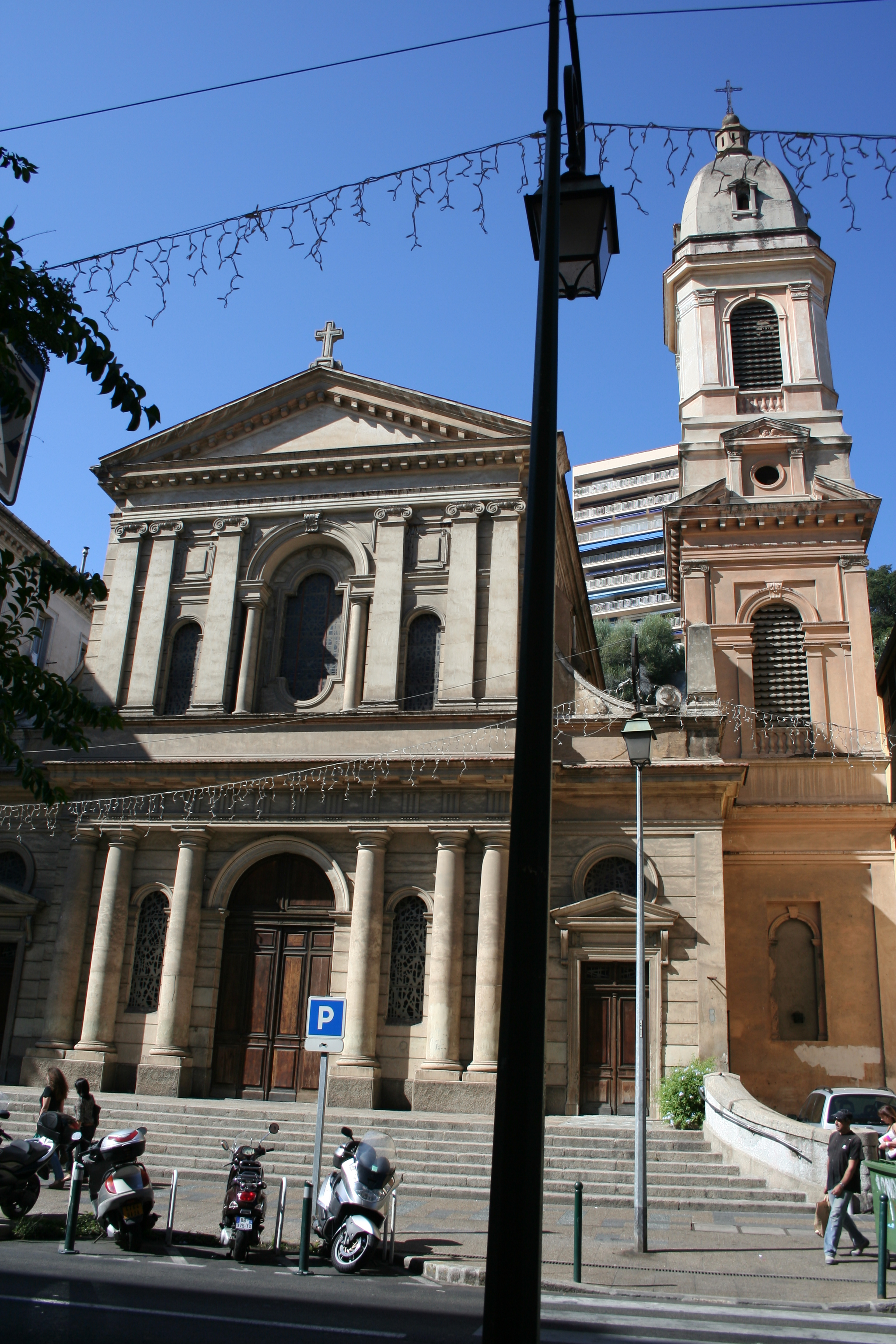 Chiesa neoclassica ad Ajaccio in Cours Napolèon